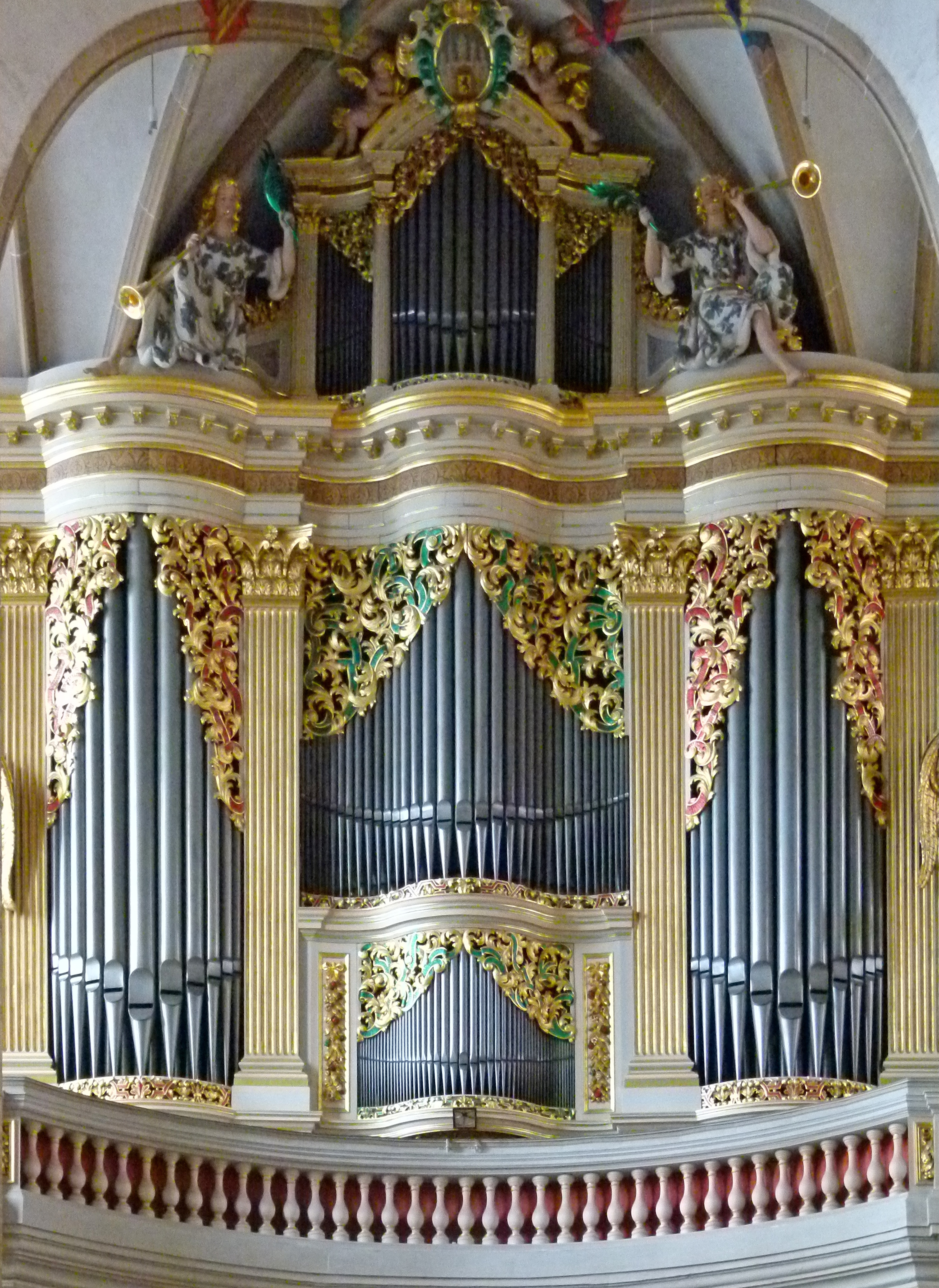 Die Große Silbermannorgel im Freiberger Dom, Freiberg, Sachsen